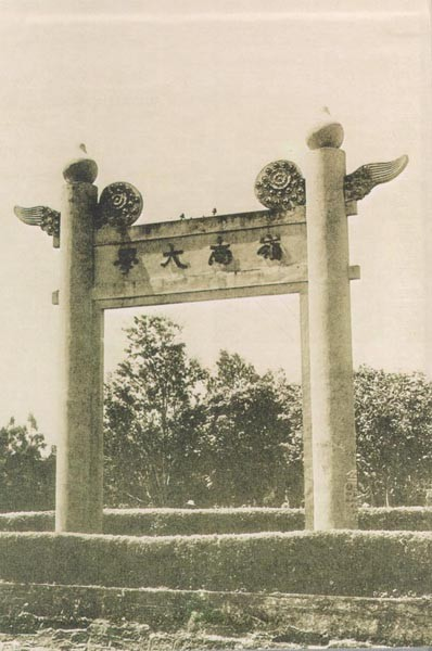 廣州私立嶺南大學石牌坊